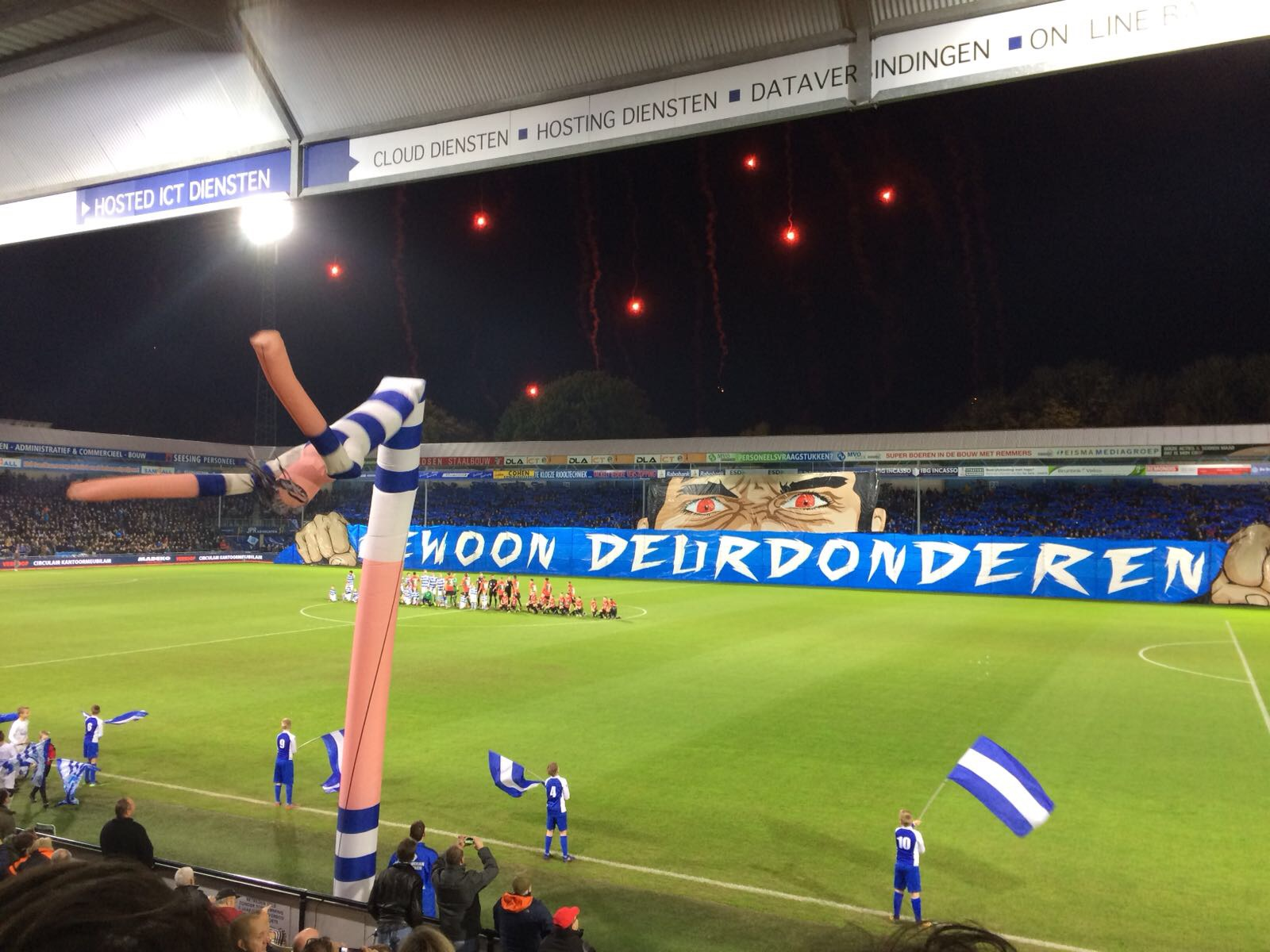 Sfeeractie voorafgaand de wedstrijd van De Graafschap